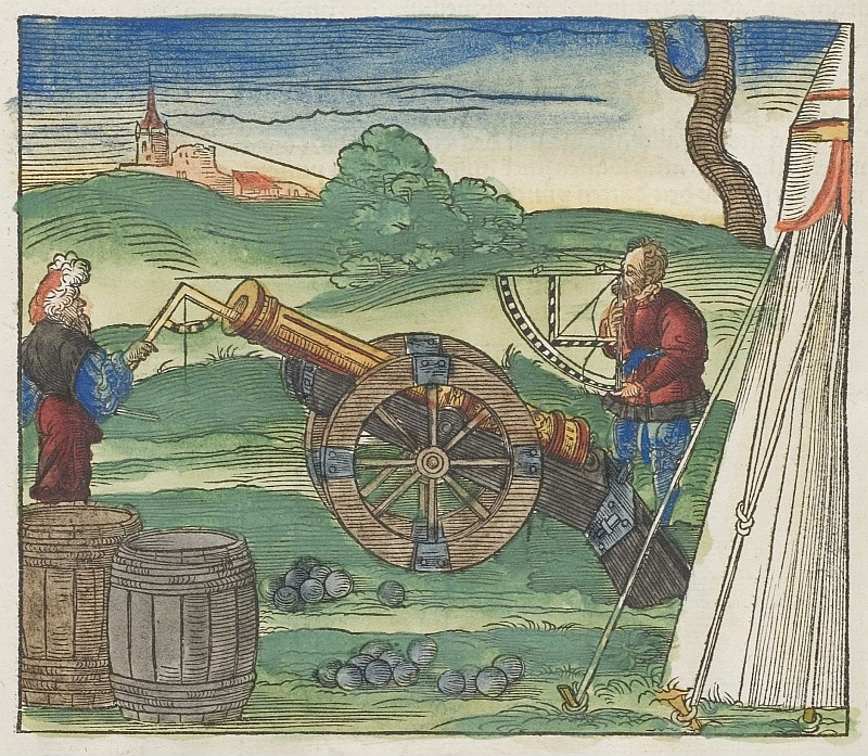 Original image description from the Deutsche Fotothek Ballistik & Quadrant & Kanone